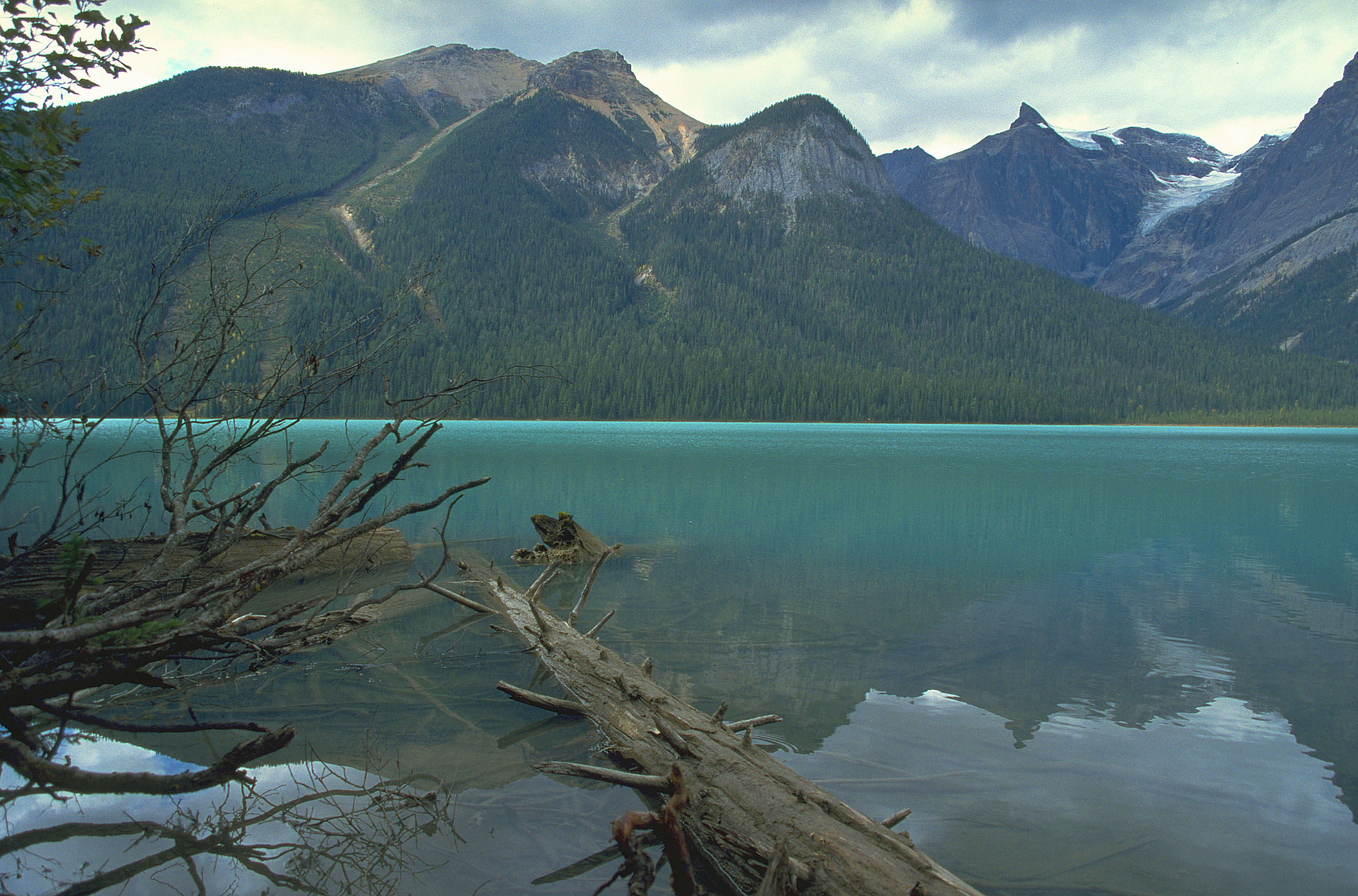 Auf dem Transcanada Highway No.1 verließen wir den Banff-NP und fuhren über den Kicking Horse-Paß(1647m hoch) Richtung Golden. Im kleinen, aber spektakulären Yoho-Nationalpark genossen wir einen kurzen Hike rund um den bezaubernden Emerald-Lake. Weitere Highlights des Parks: die Takakkaw-Falls (384m hoch), Natural Bridge und die in der Nähe befindlichen Spiral-Tunnel. Der Burgess-Shale mit seinen fossilen Fundstätten ist ein weiteres "Must". Fotografiert mit Canon EOS 5 u. Canon Objektiv 28-135mm (in 28mm Stellung) Belichtungszeit: 1/125 Digitalisiert mit Kodak-Photo-CD, EBV mit PSP 7.